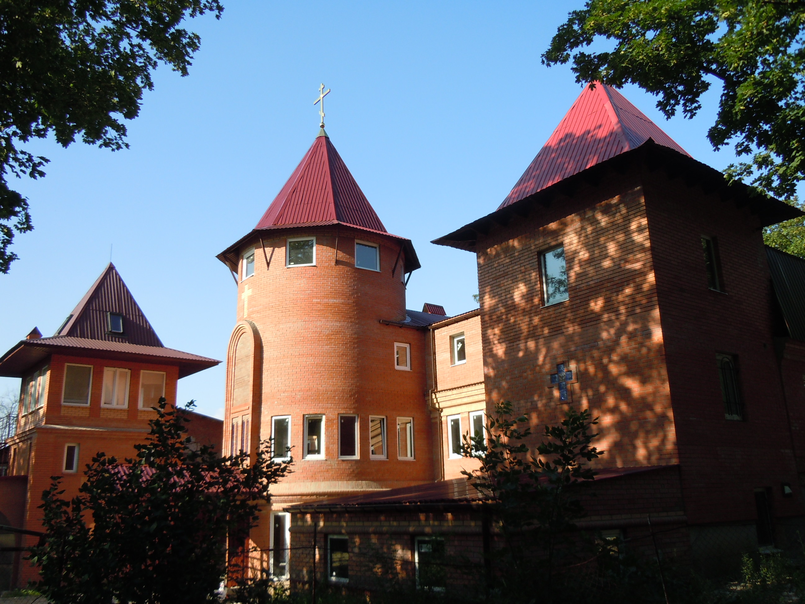 Михайлівська церква, Одеса